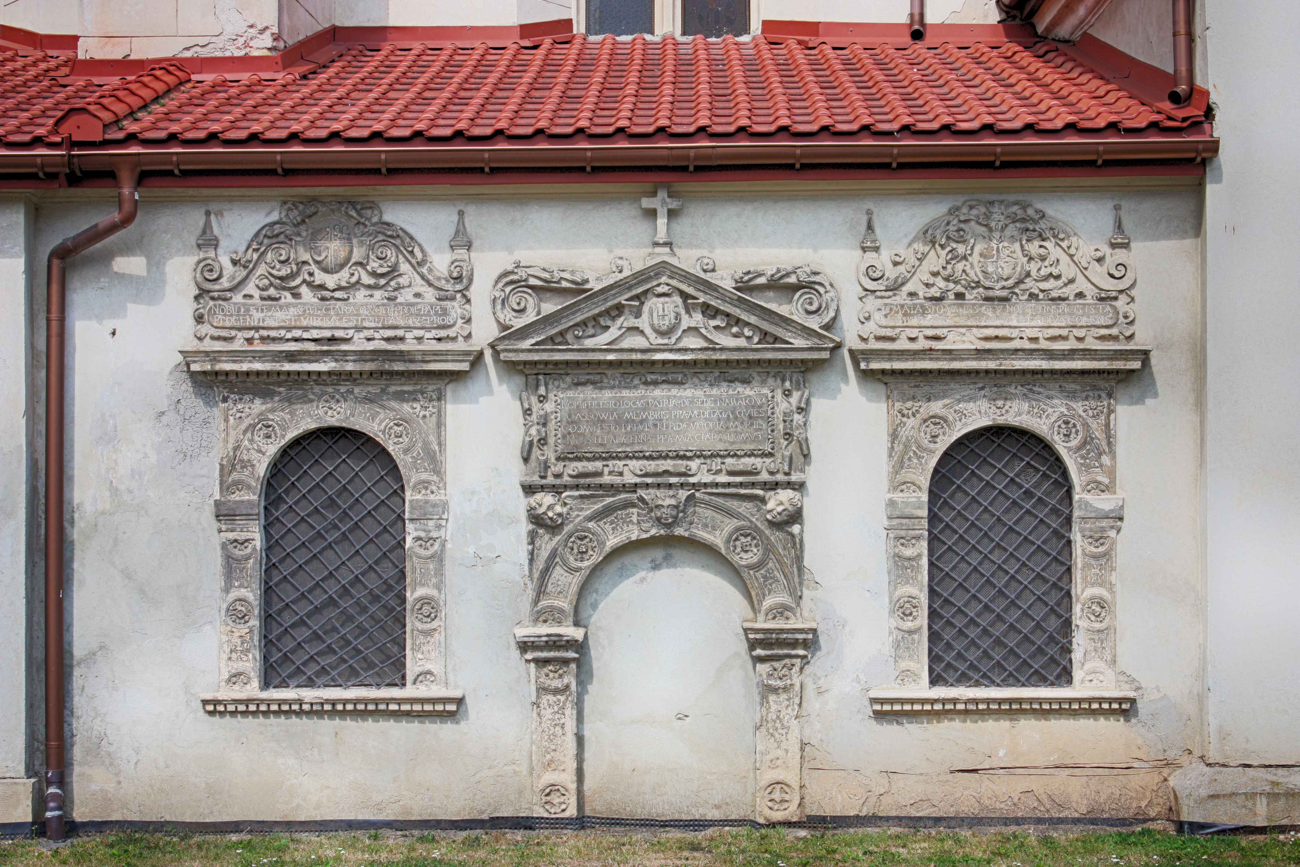 Костел Різдва Пресвятої Діви Марії по вул. 22 Січня (Стрий)